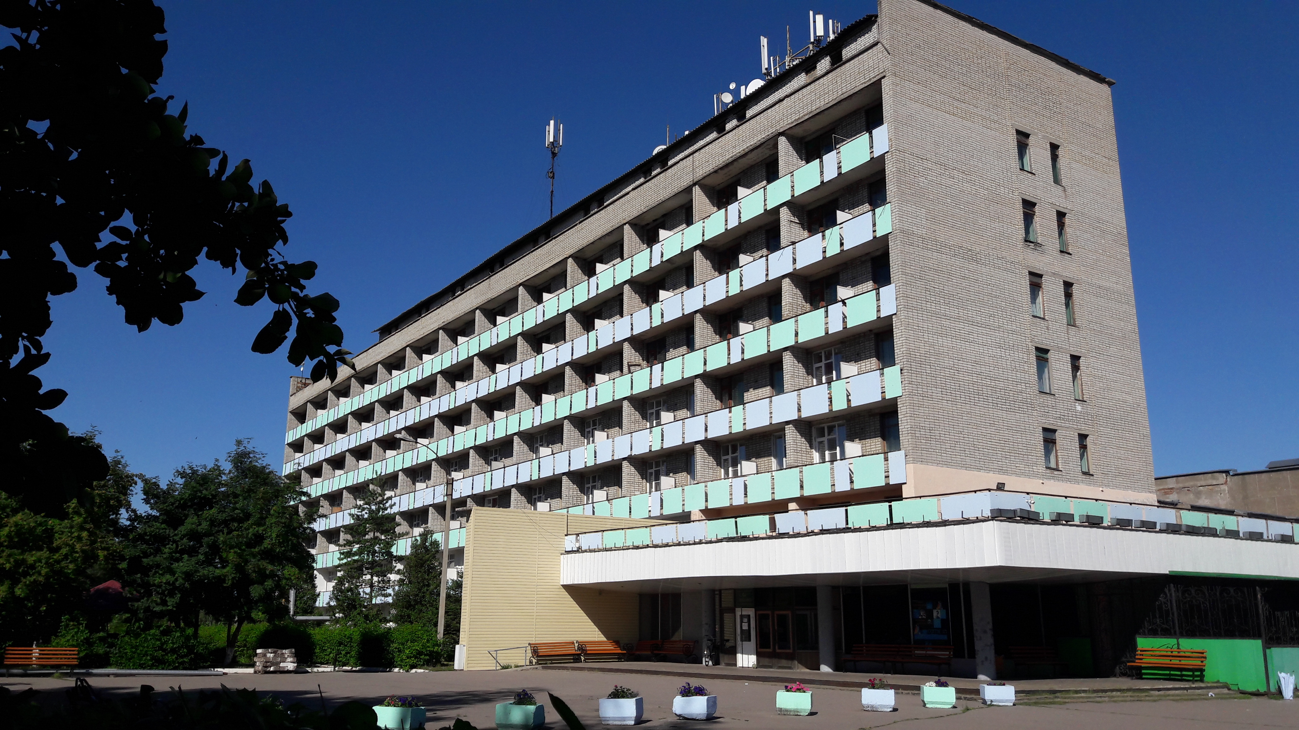 Вход в санатория им.Калинина